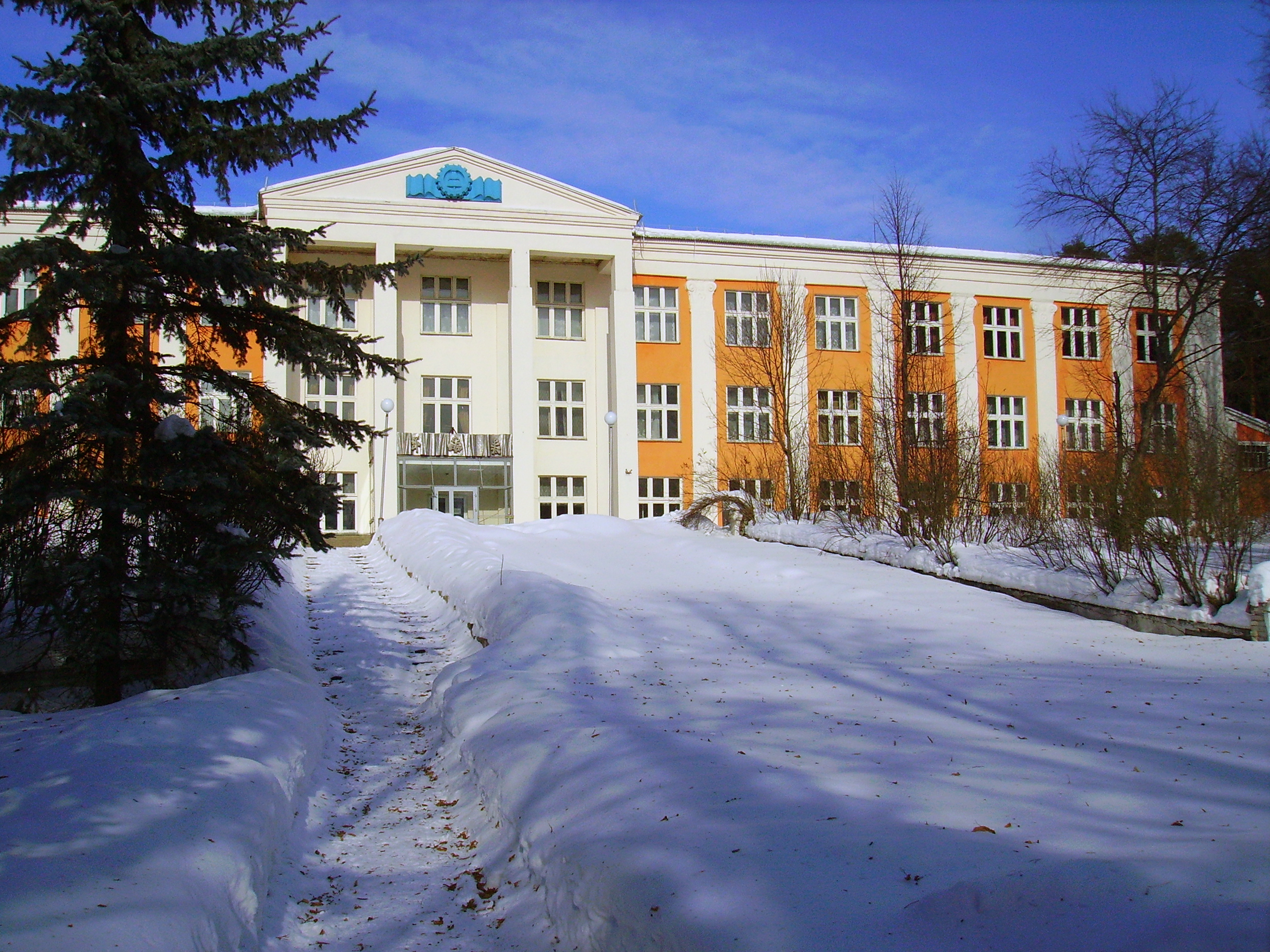 Ветлуга. Ветлужский лесотехнический техникум.